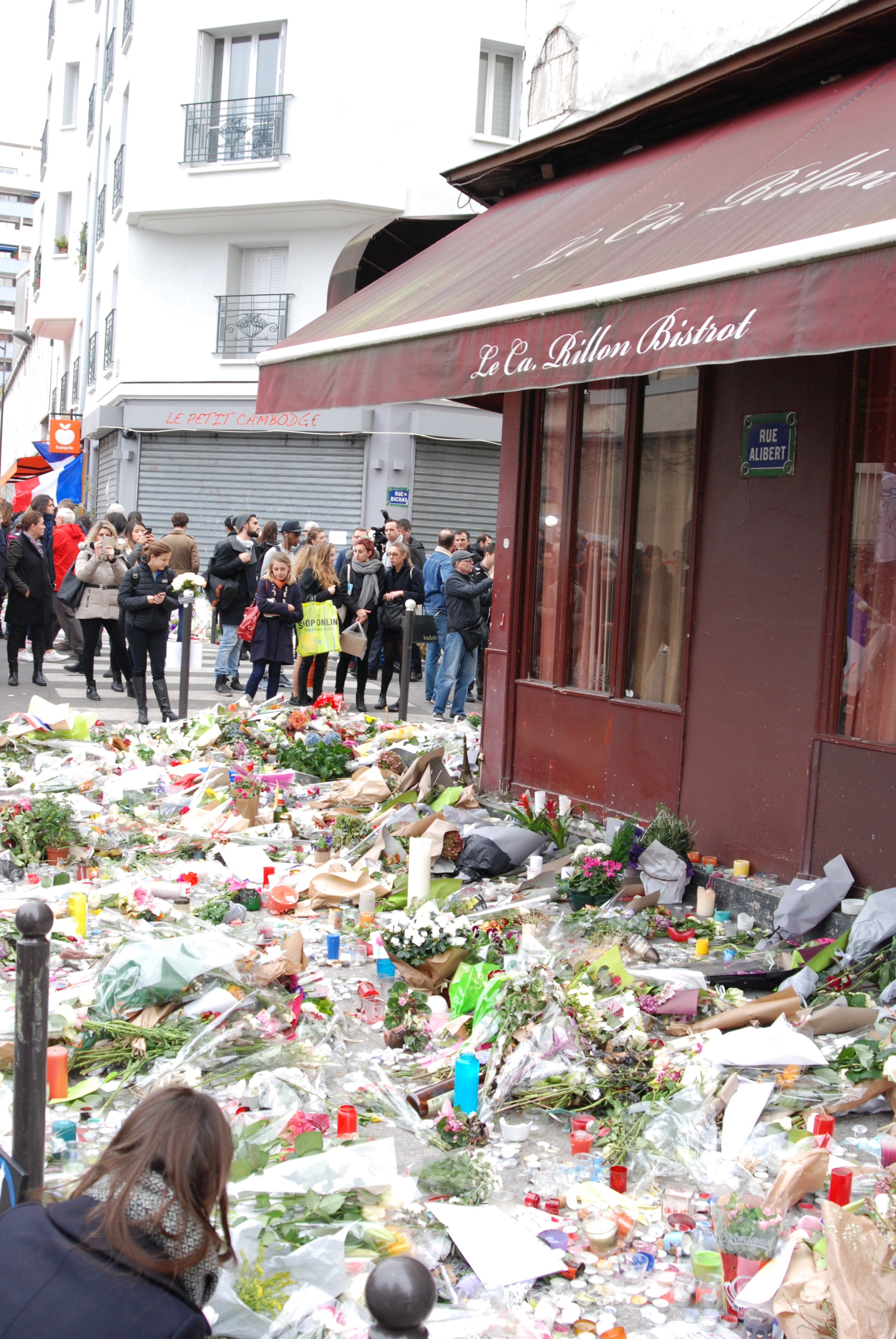 A l'angle de la rue d'Alibert et de la rue Bichat, une foule se recueille devant les bistrots Le Ca Rillon et au fond restaurant le petit Cambodge touchés par les attentats du 13 novembre 2015 à Paris